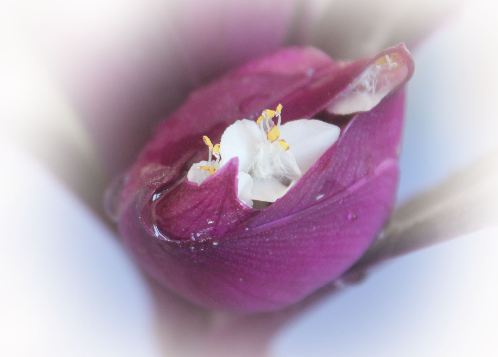 Цветок Рэо крупным планом